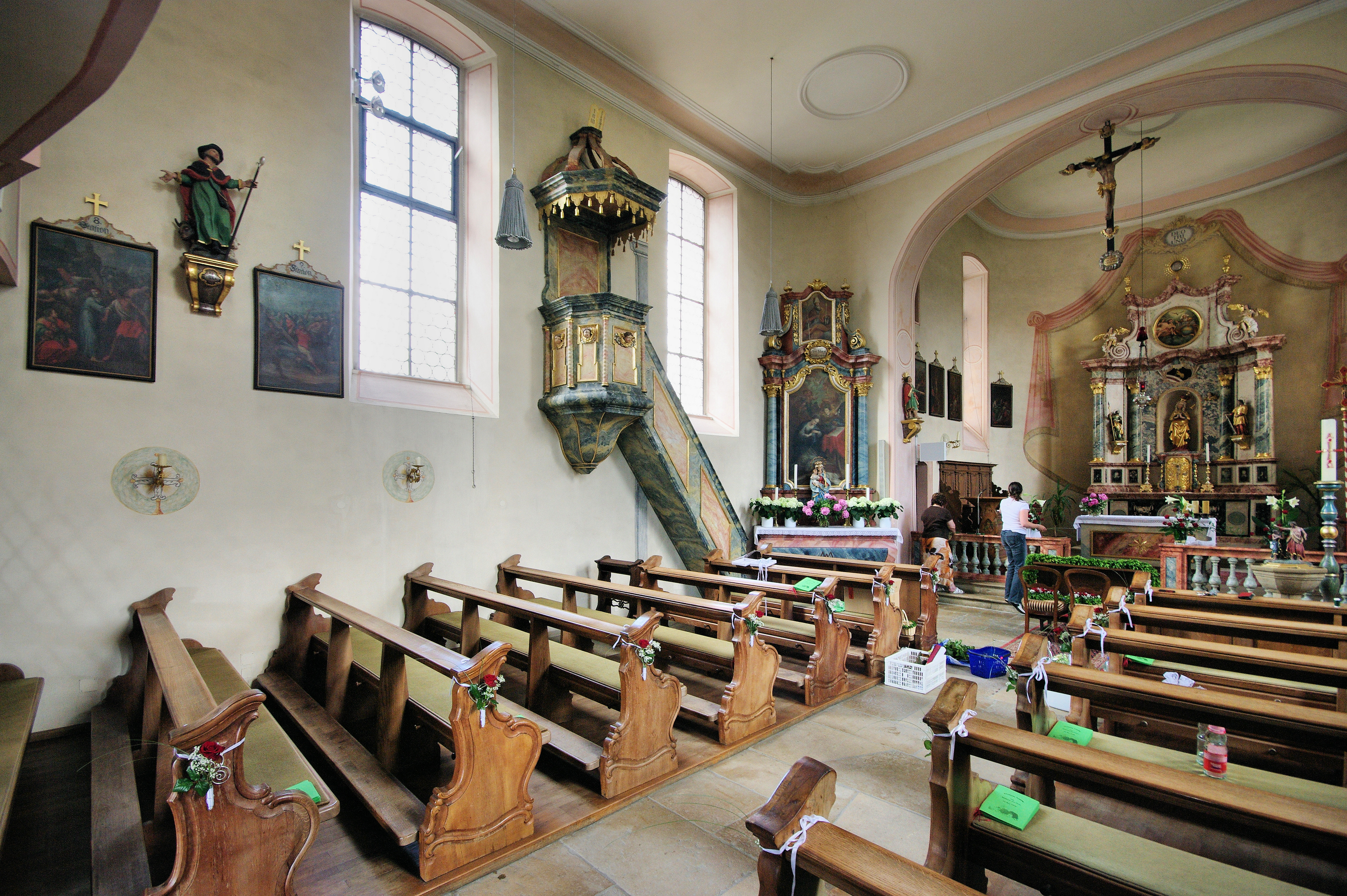 Pfarrkirche St. Thomas in Betzenhausen ein Stadtteil Freiburgs Die linke Hälfte des Innenraums